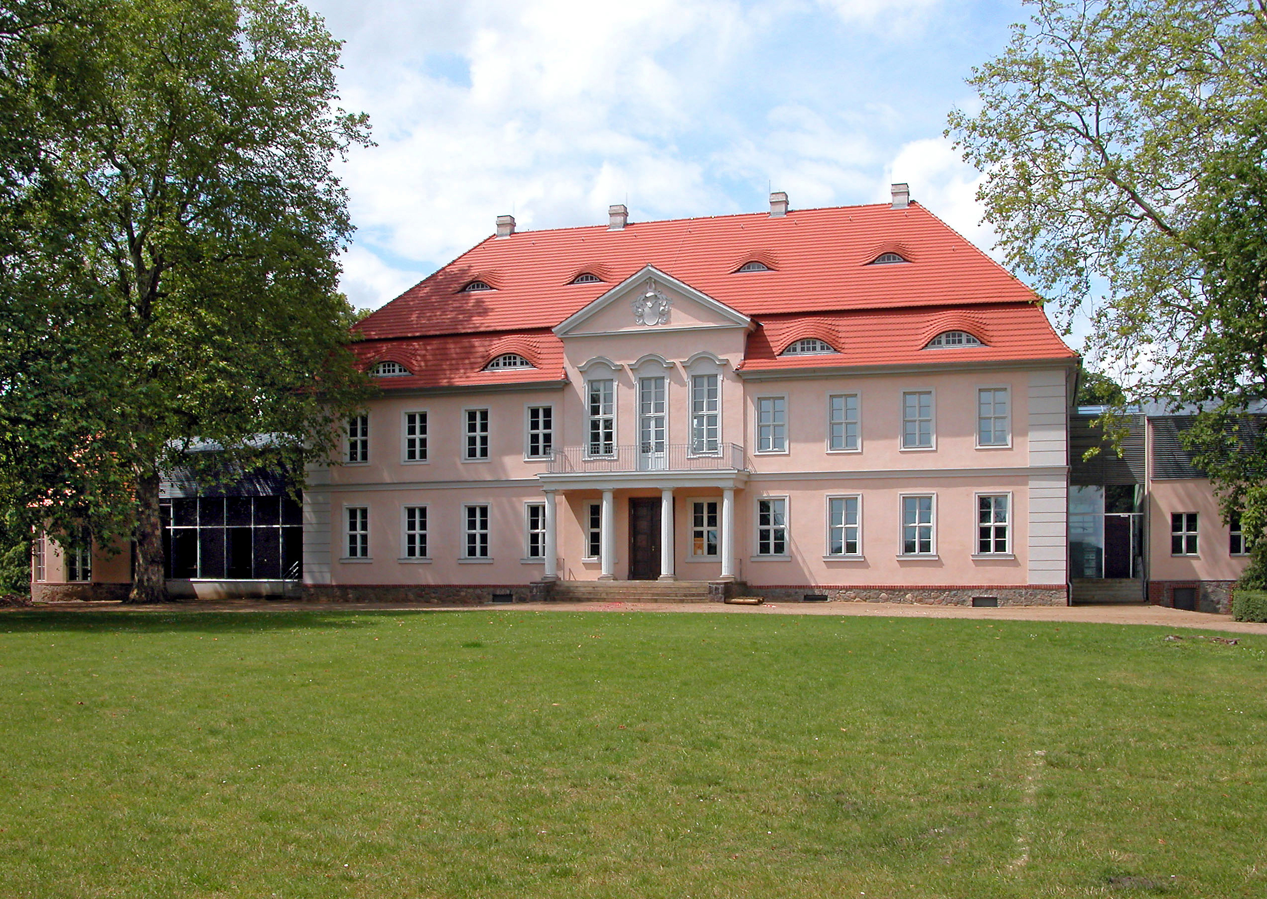 03.07.2004 16306 Criewen (Schwedt/Oder): Schloß von 1820 im Landschaftspark von J. P. Lenné. Das für den Rittmeister Otto von Arnim errichtete Schloß (GMP: 53.011329,14.221403) ist heute Sitz der Brandenburgischen Akademie Schloß Criewen. [DSCN4720.JPG]20040703140.JPG(c)Blobelt